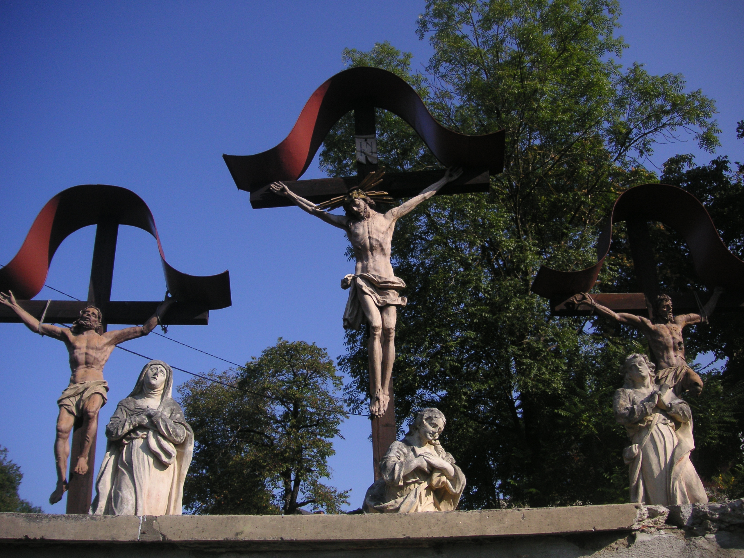 Der Kalvarienberg in Deutschfeistritz, Kreuzigungsgruppe